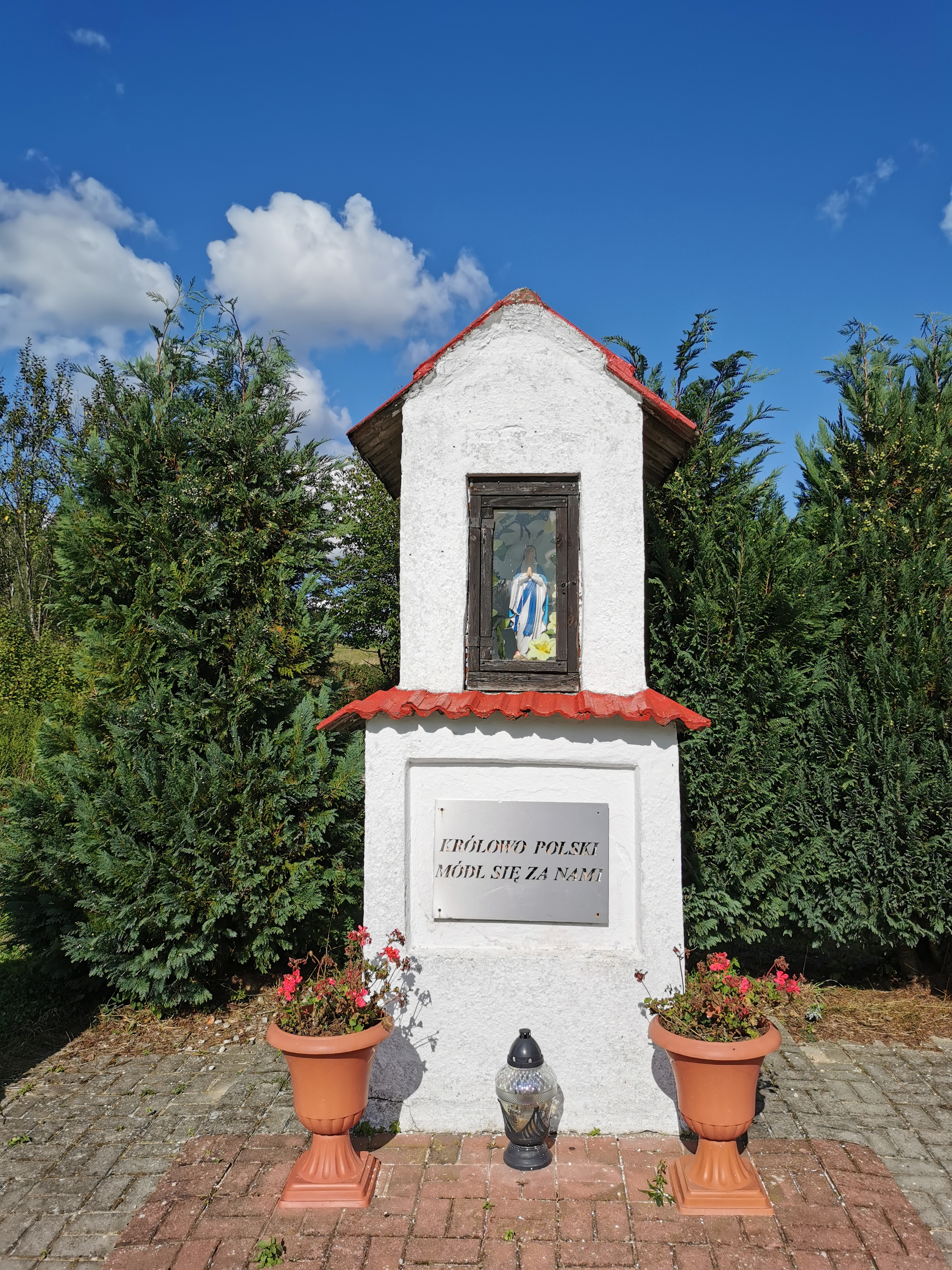 Przydrożna kapliczka w Witanowie